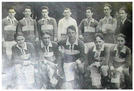 Fotografia do time principal do Esperança, em 1921